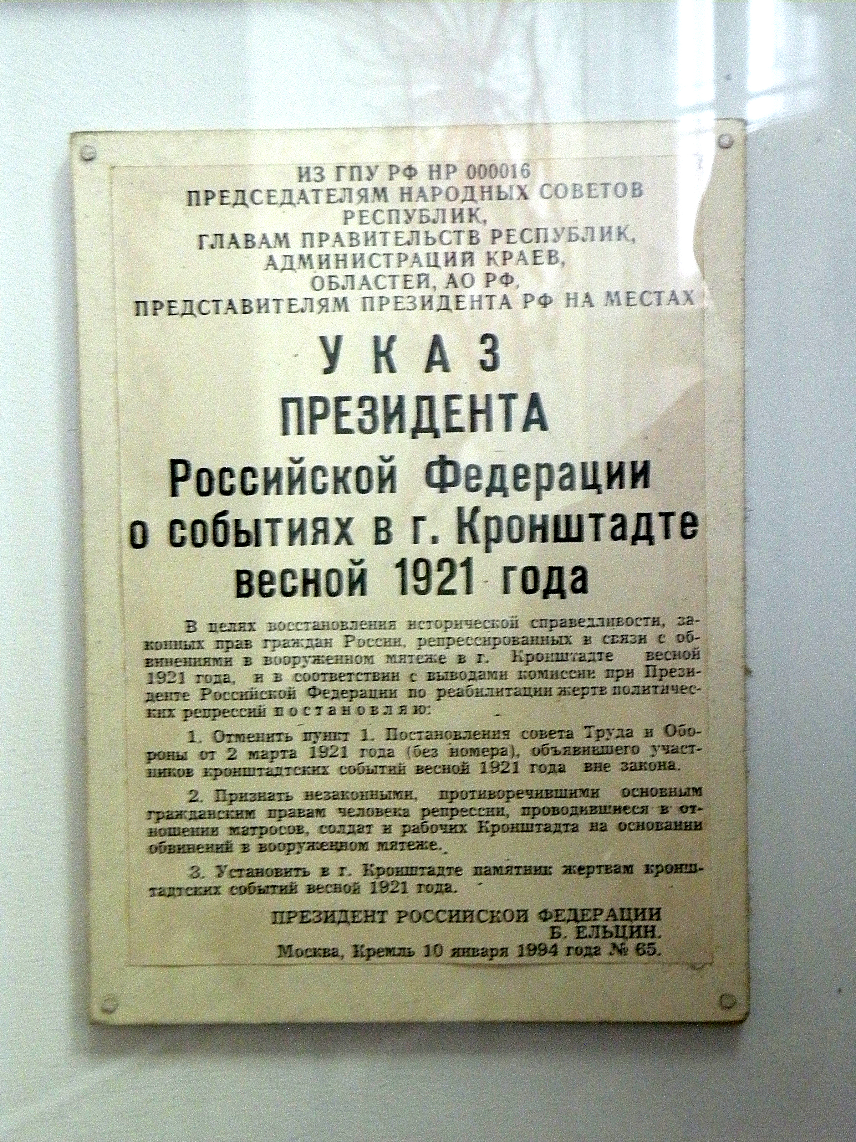 Указ Ельцина о реабилитации участников Кронштадтского восстания.